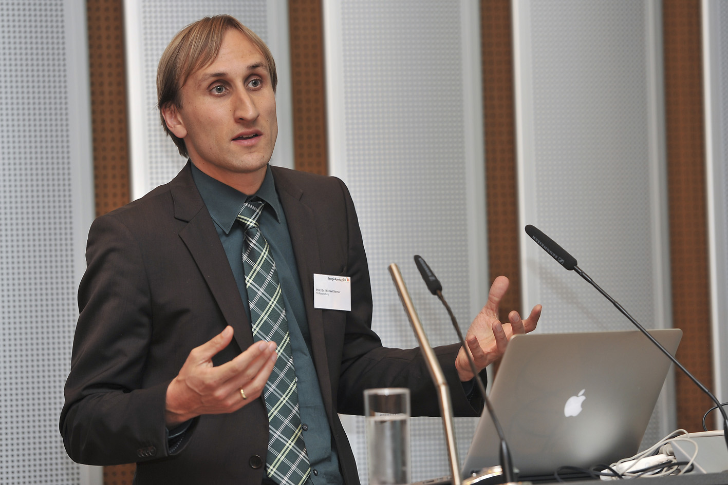 Energiemarktdesign im Systemzusammenhang: Zusammenspiel der Sektoren Strom, Wärme und Verkehr Am 5. September 2013 veranstaltete die EnergieAgentur.NRW in Kooperation mit dem Ministerium für Klimaschutz, Umwelt, Landwirtschaft, Natur- und Verbraucherschutz des Landes Nordrhein-Westfalen eine Tagung zum Thema „Energiemarktdesign im Systemzusammenhang: Zusammenspiel der Sektoren Strom, Wärme und Verkehr“ im S-Forum im Finanzkaufhaus der Düsseldorfer Stadtsparkasse. Schwerpunkt der Veranstaltung ist die Rolle der Erneuerbaren Energien in den Bereichen Strom, Wärme und Verkehr und ein aktiver Austausch über die Erfordernisse für ein zukünftiges Design des Energiesystems.